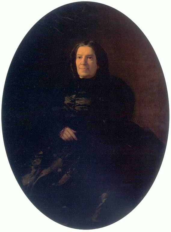 Ге Николай Николаевич. Портрет В.Н.Ростовцевой. 1861г.